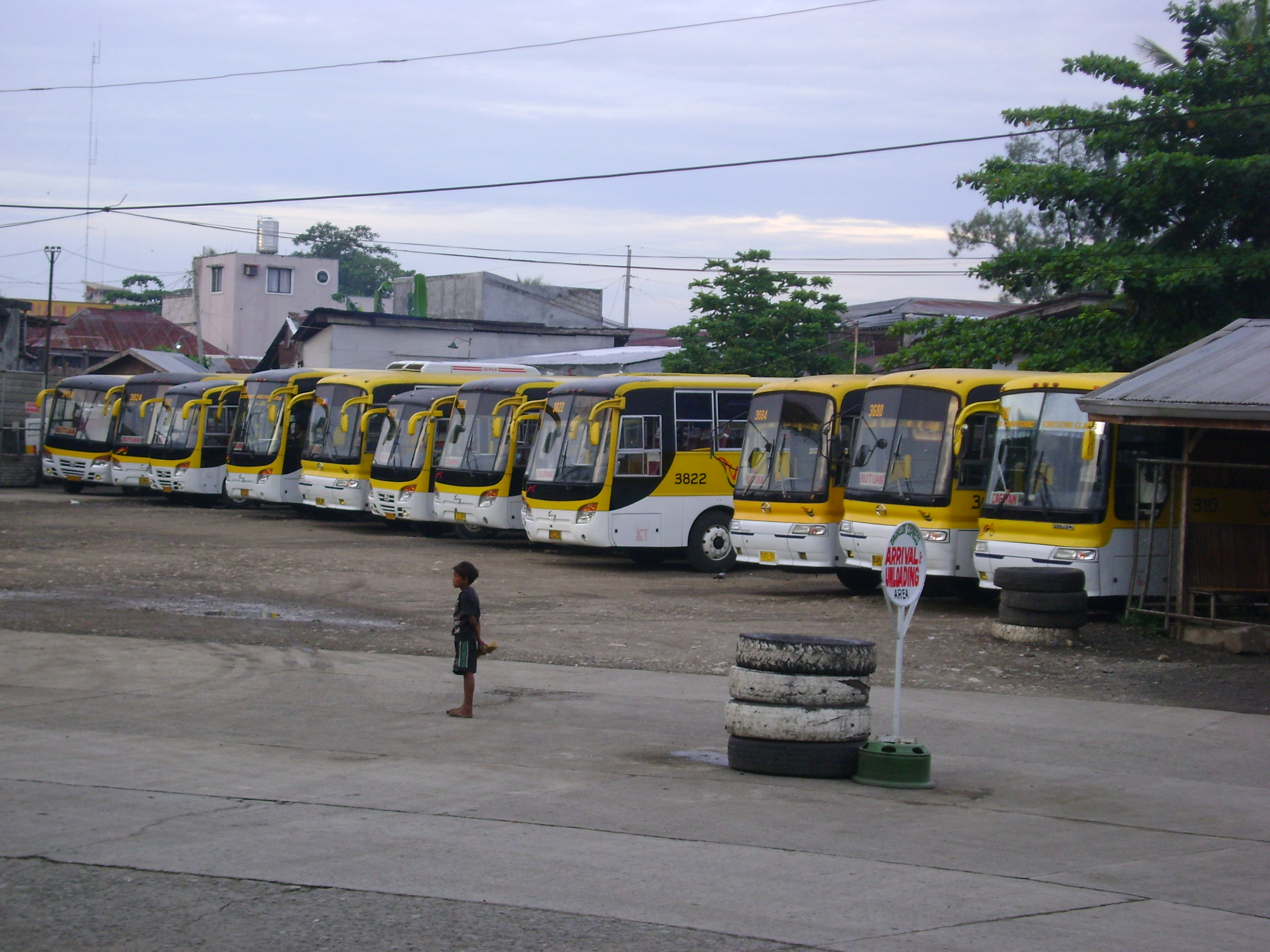 Butuan bus terminal